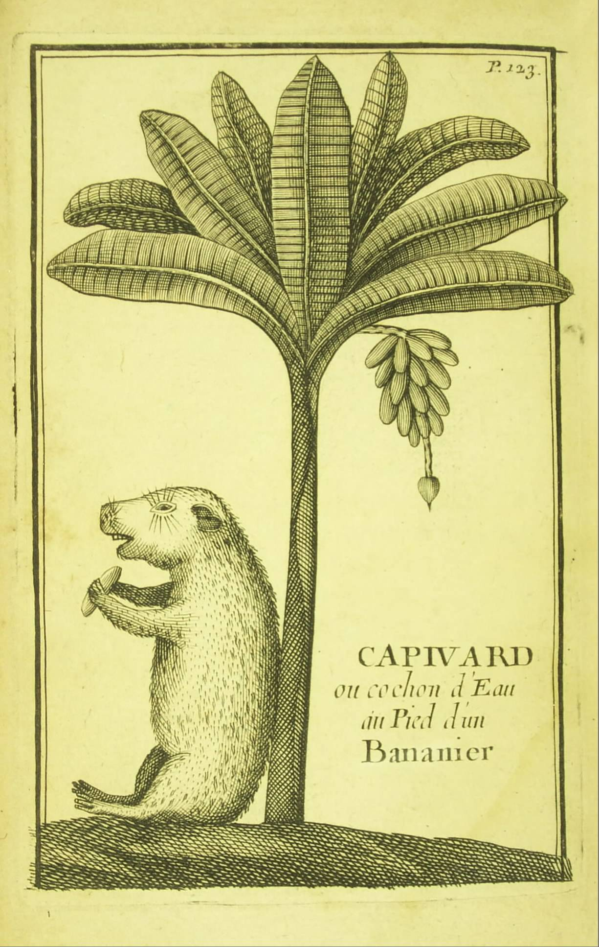 Ilustração da obra de François Froger, Relation d'un voyage, publicada em 1698.